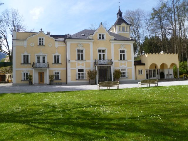 Hotel Restaurant Maria Theresien-Schlössl. Salzburg-Morzg.